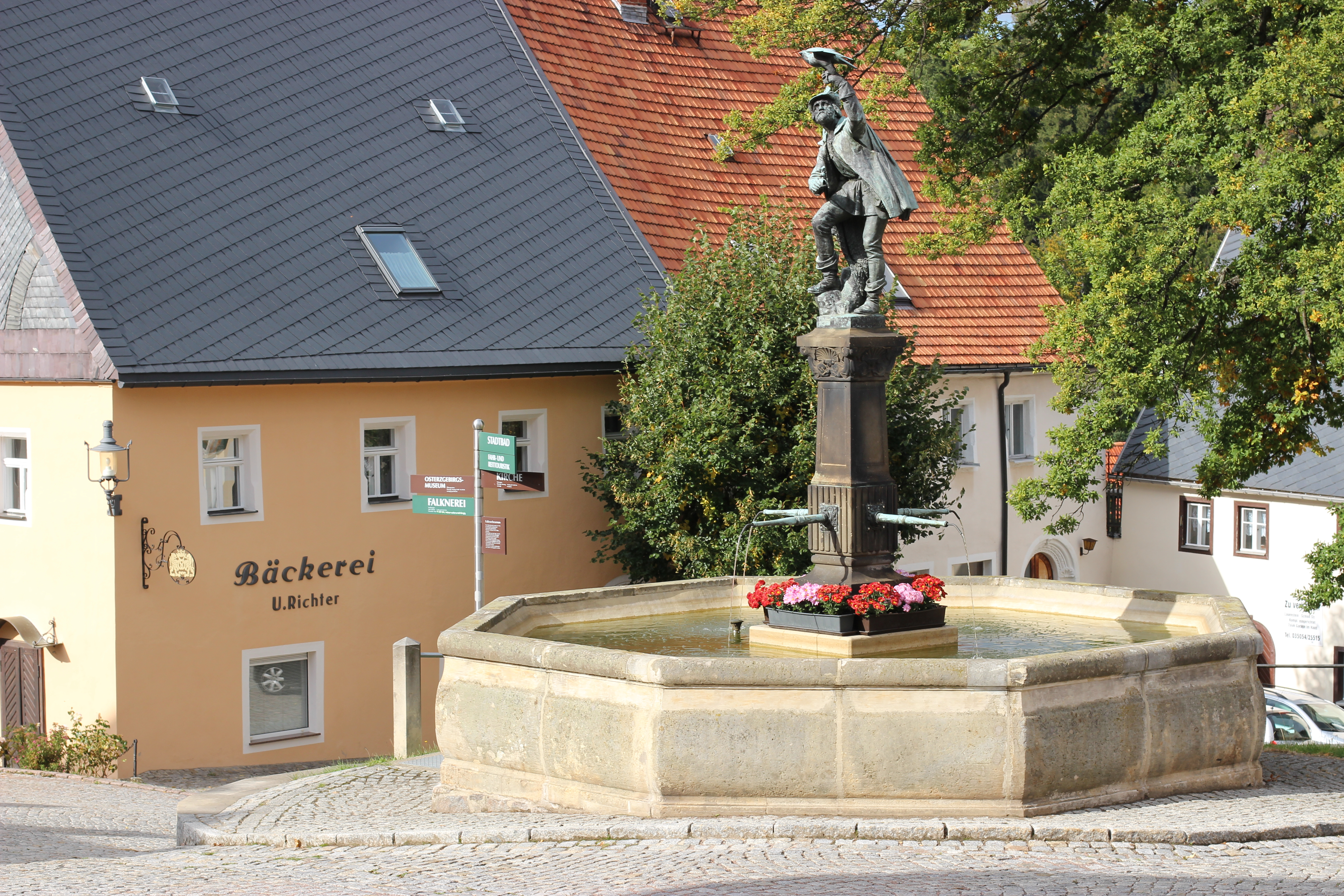 Falknerbrunnen in Lauenstein/Sachsen